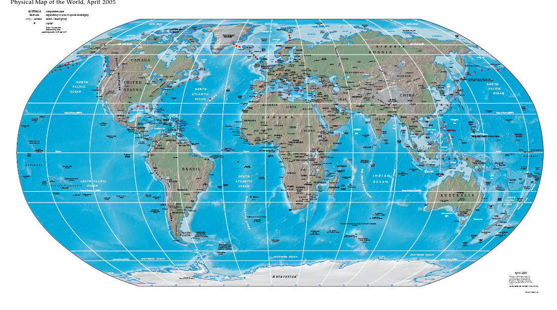 Die Karte ist aus dem CIA-Worldfactbook. Die roten Punkte hab ich selbst auf Grundlage des Buches "Moderne Kriegsschiffe" ISBN 3-7276-7093-2 hinzugefügt.